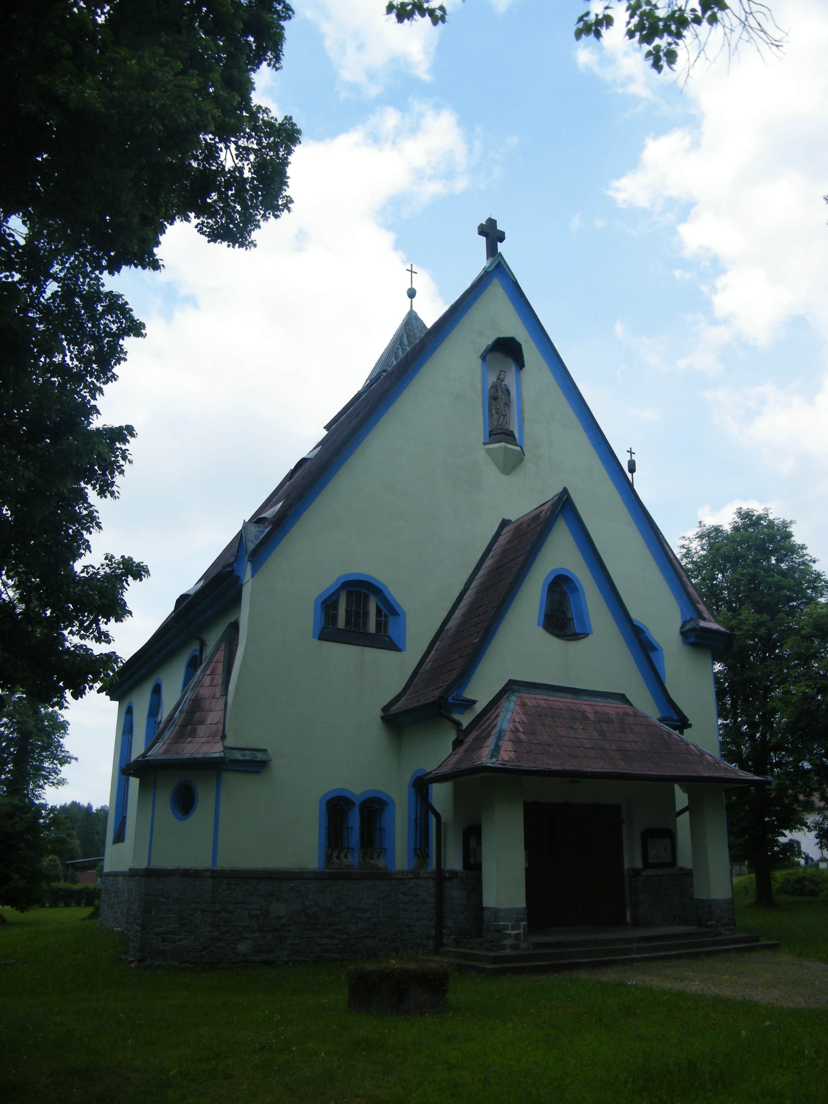 Kaple svatého Josefa v Rybništi